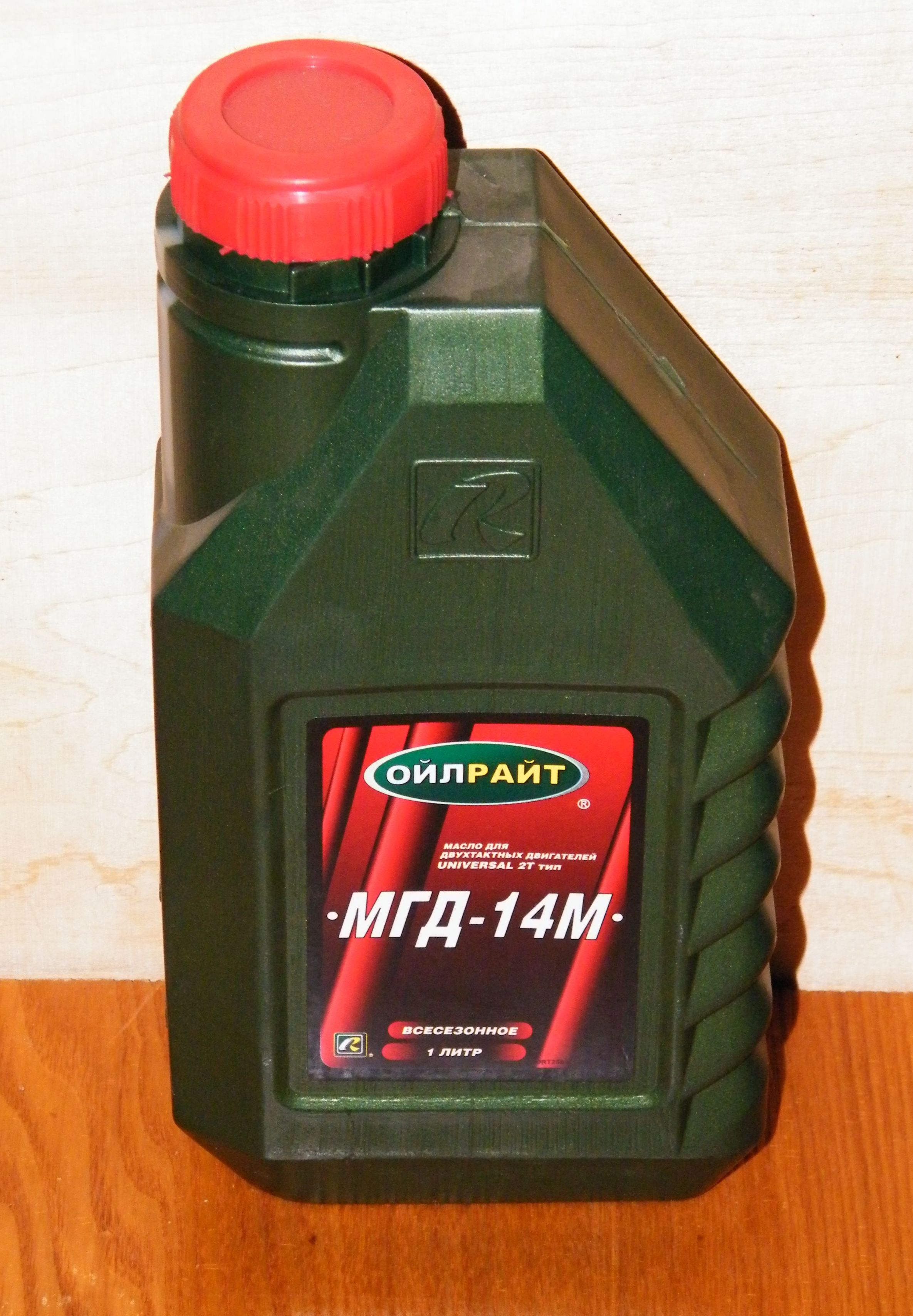 Масло МГД-14М для двухтактных бензиновых двигателей